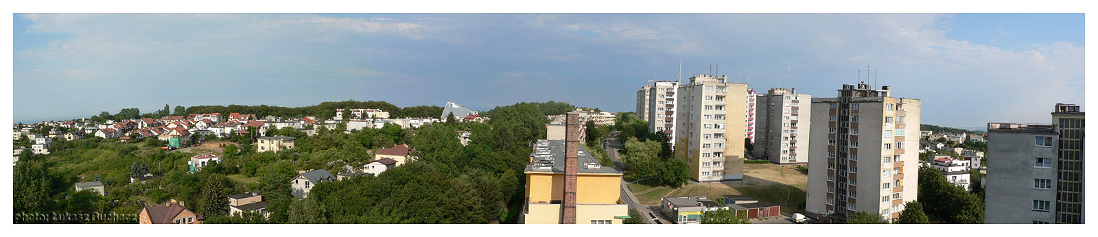 Panorama fragmentu Redłowa - widok z budynku przy ulicy Bohaterów Starówki Warszawskiej